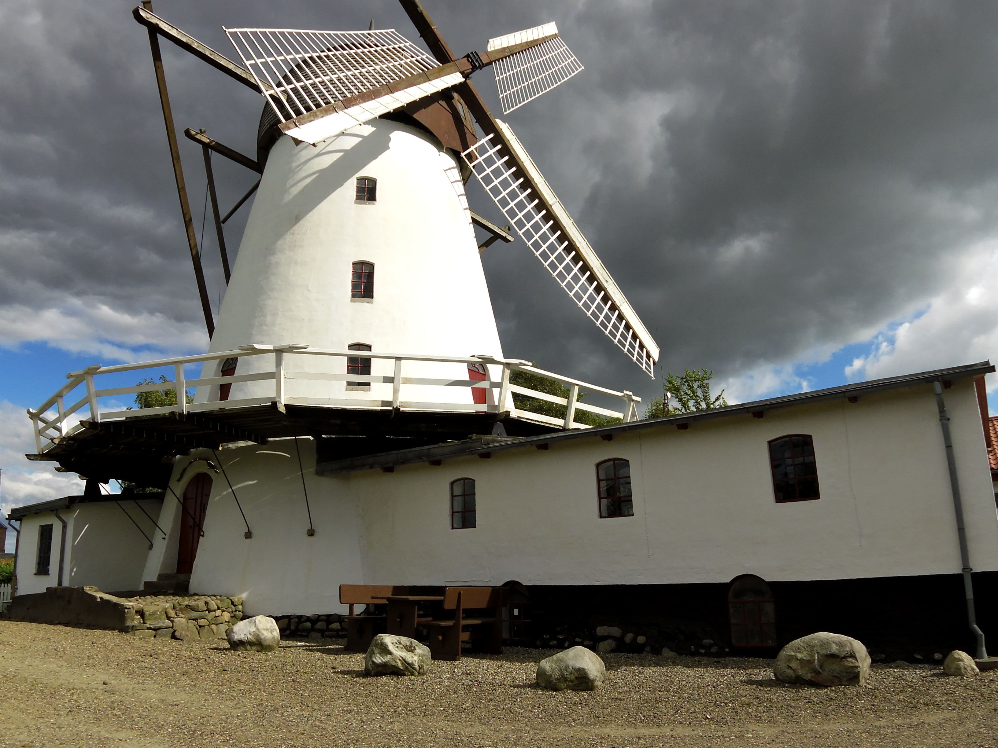 Jels Mølle